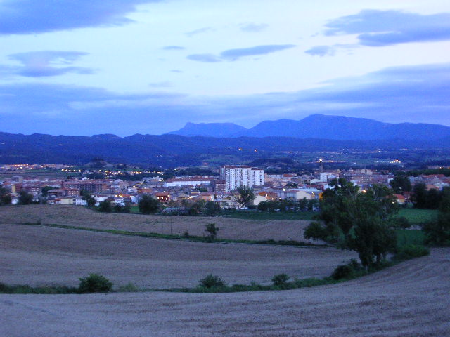 Panorámica de Manlleu desde Sant Jaume